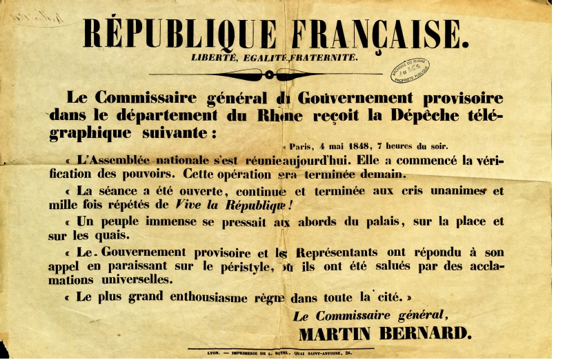 ADRML, 1 M 365.